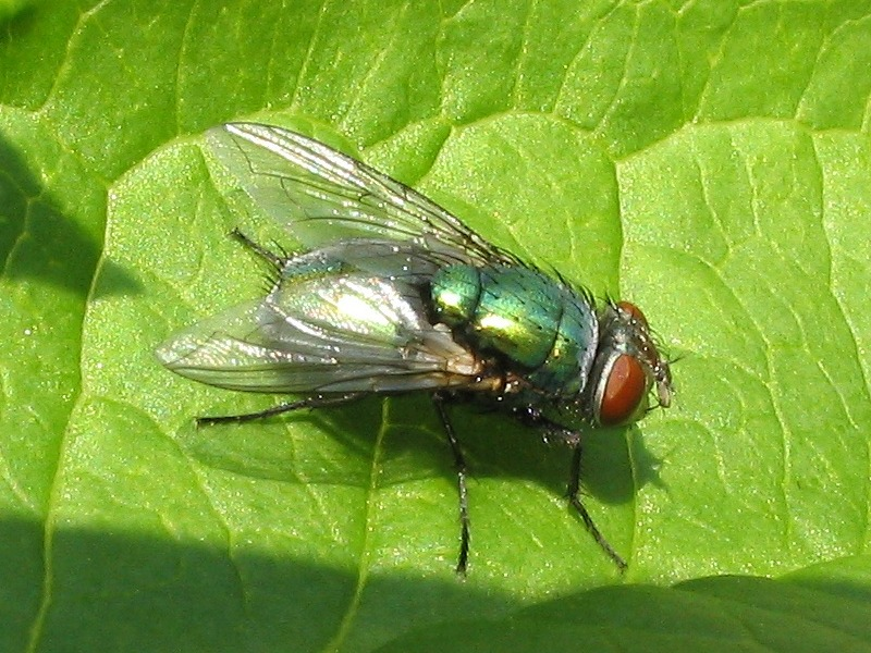 مصدر: :en:Image:Diptera 02gg.jpg Green Bottle Fly (Family Calliphoridae). Probably Phaenicia sericata. Photo by Gilles Gonthier. Lower Saint Lawrence region, Quebec, Canada.